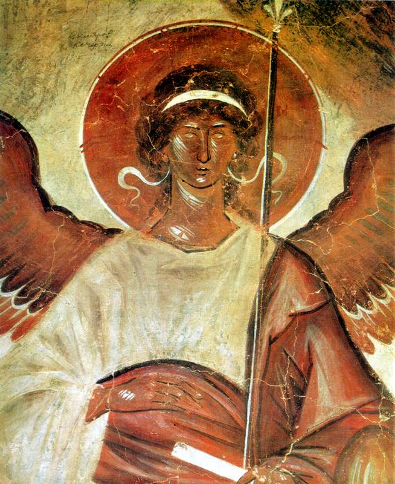 Фрески церкви Спаса на Ильине